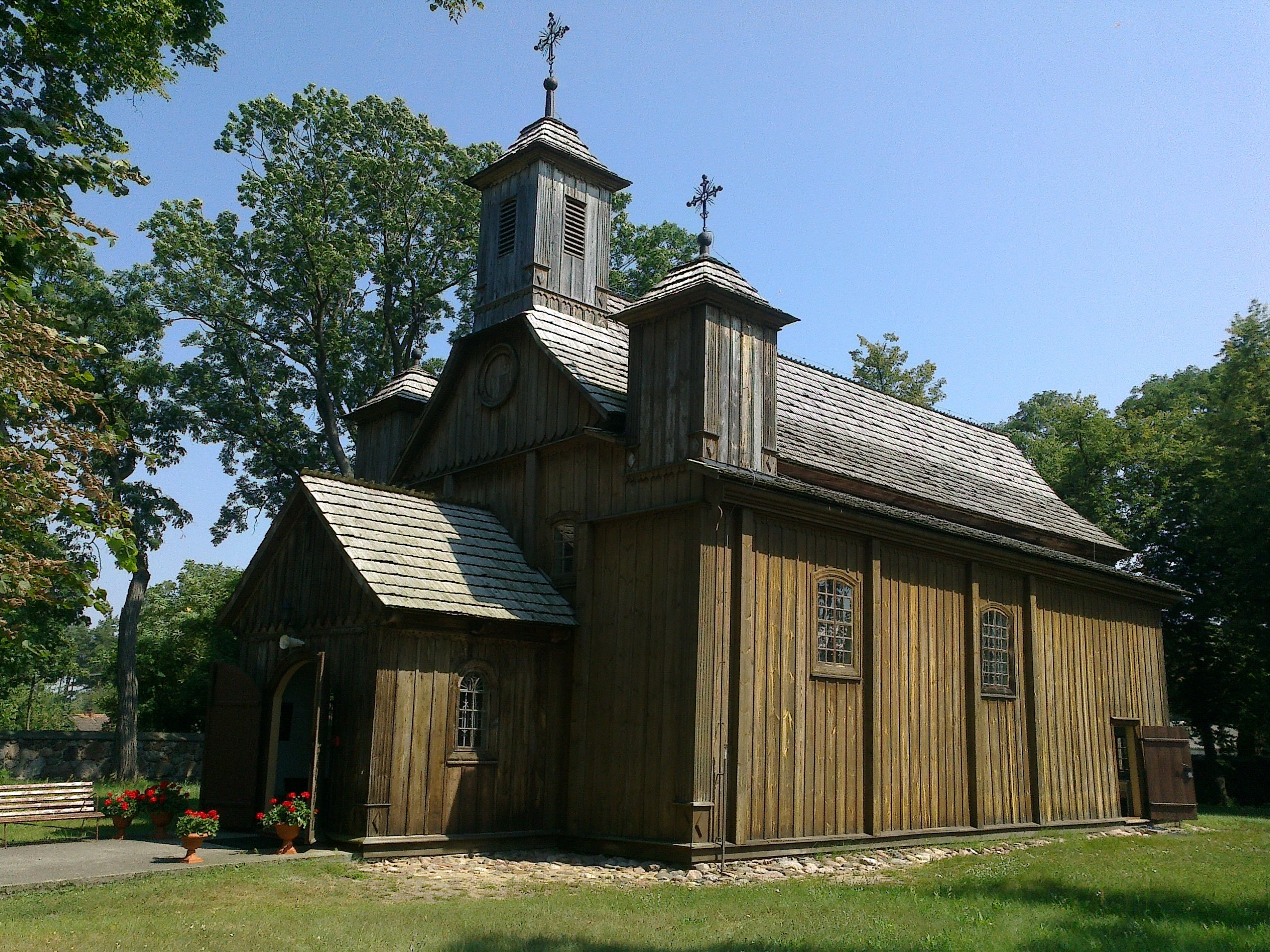 Barcice (gm. Somianka, pow. Wyszków) - kościół Św. Stanisława BM z 1758 r.